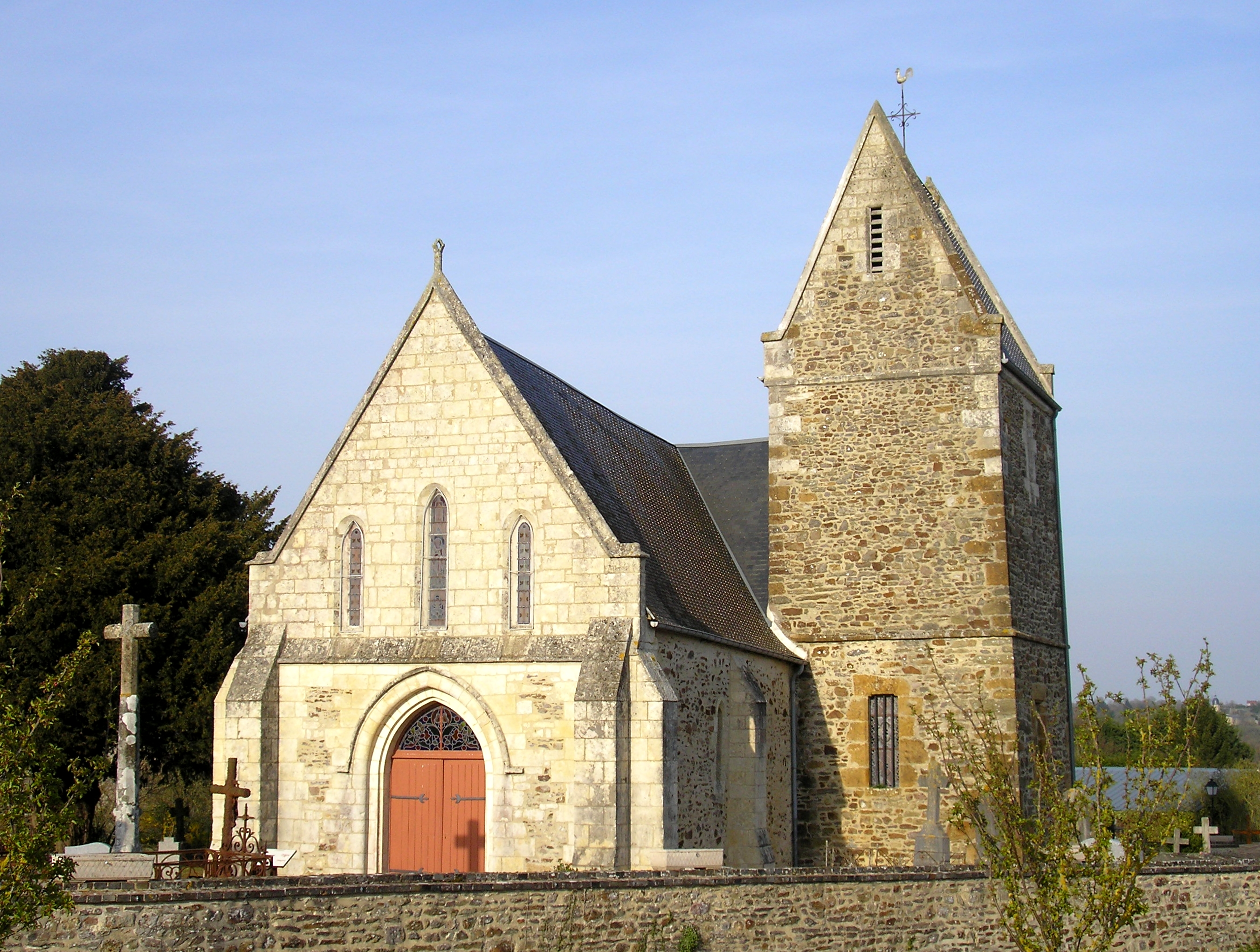 Combray (Normandie, France). L'église Saint-Martin.